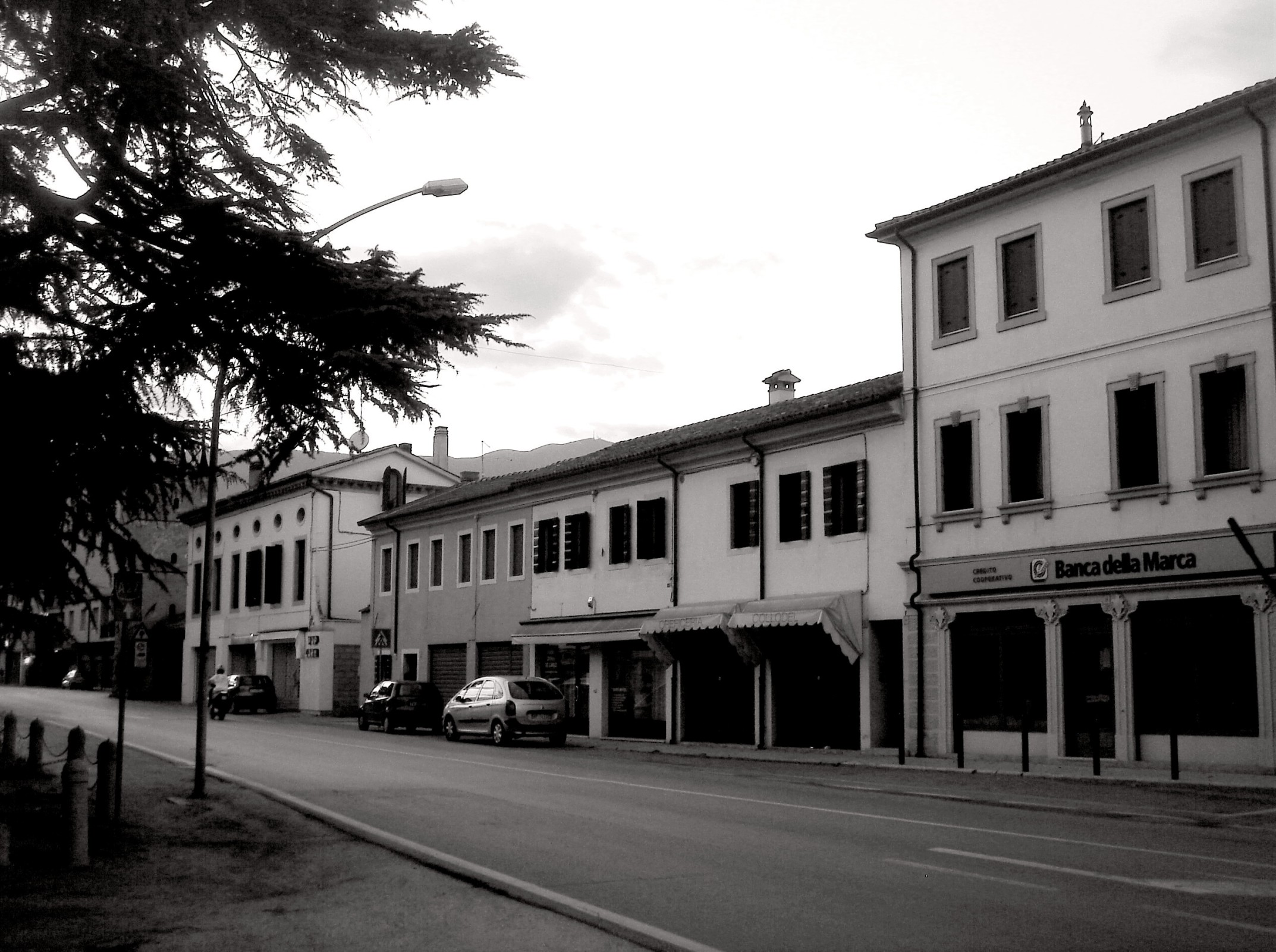 San Giacomo di Veglia (Vittorio Veneto, Treviso, Italia): veduta del borgo centrale verso il campanile (che si intravede a sinistra) lungo via Menaré.